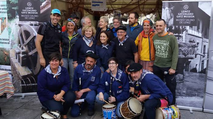 Idurre Bideguren Bermeoko alkatea (2011-2019). Gatzaga-Bermeo mendi-martxaren bukaeran 2017an.